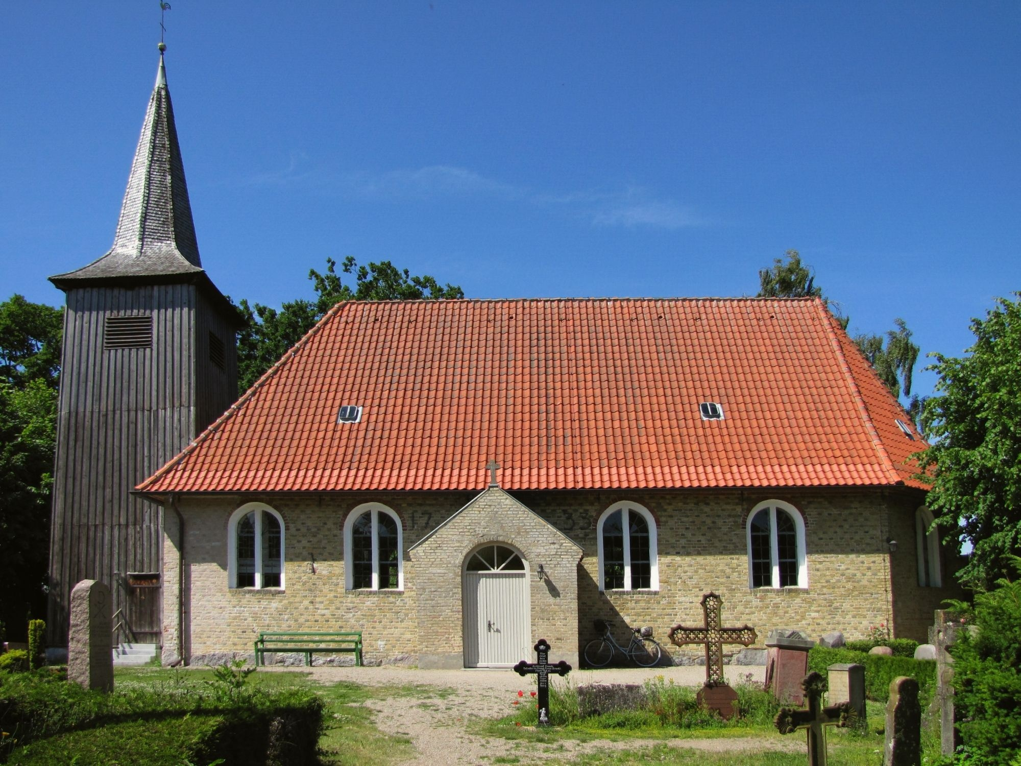 Kulturdenkmal in der Stadt Arnis an der Schlei: die Schifferkirche von 1673 (Mauerwerksseite/Ansicht von der Schlei) in Schleswig-Holstein - Foto Wolfgang Pehlemann IMG_8794